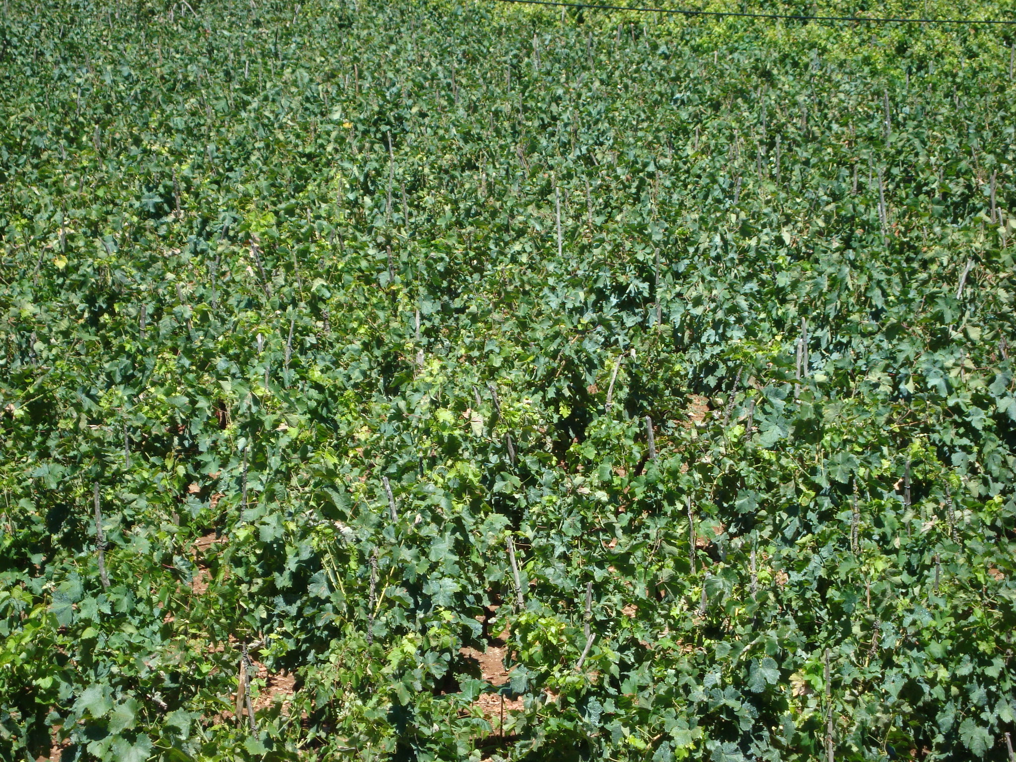 Vinogradi na Mljetu, Hrvatska Vineyards on the island of Mljet, Croatia